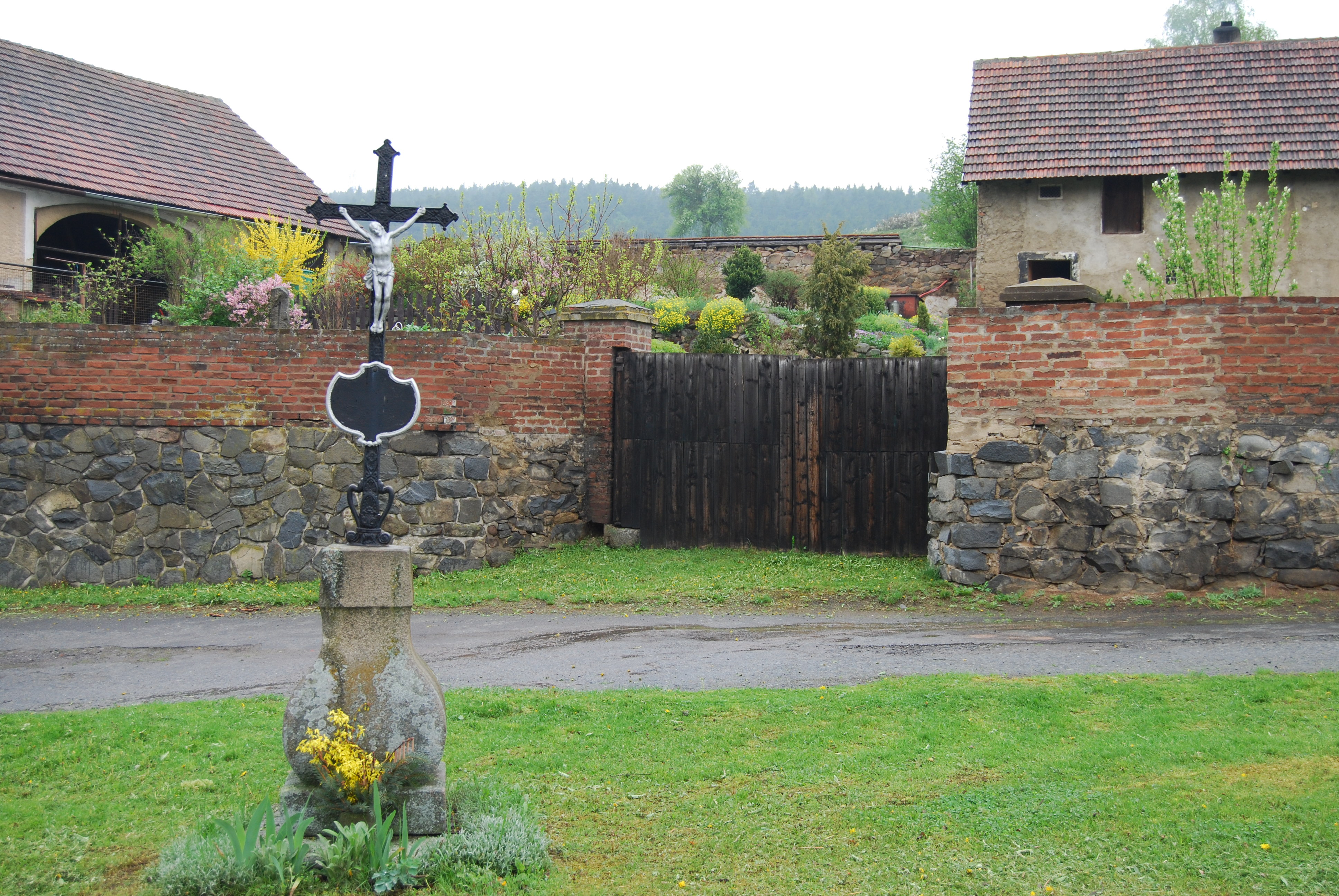 Kříž ve vesnici. Obec Obory v okrese Příbram, kraj Středočeský. Česká republika.